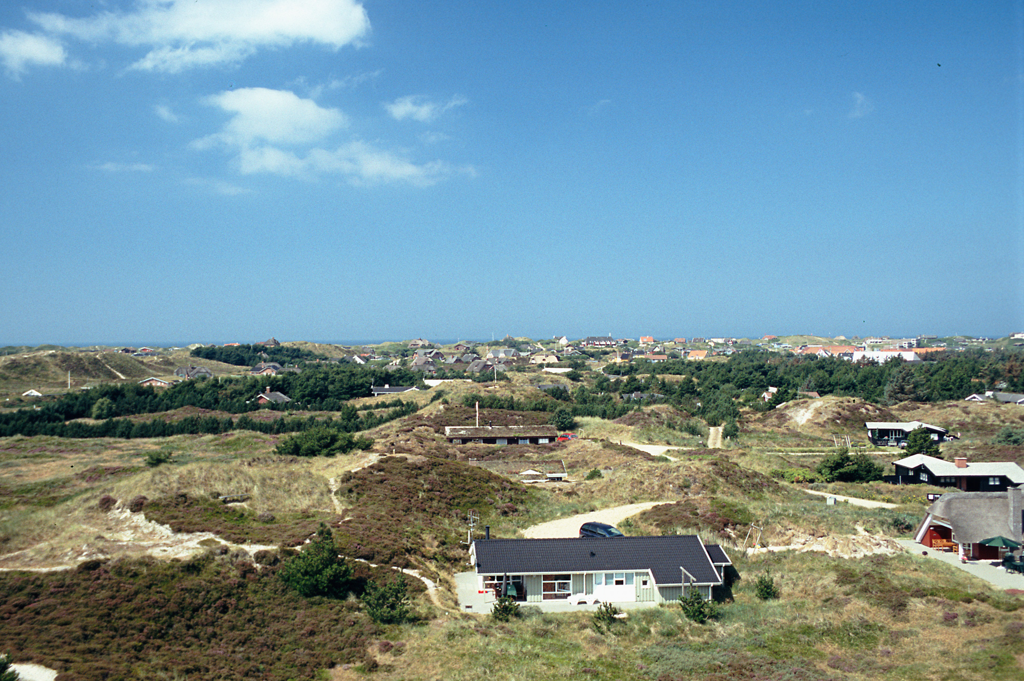 Blick über Henne Strand